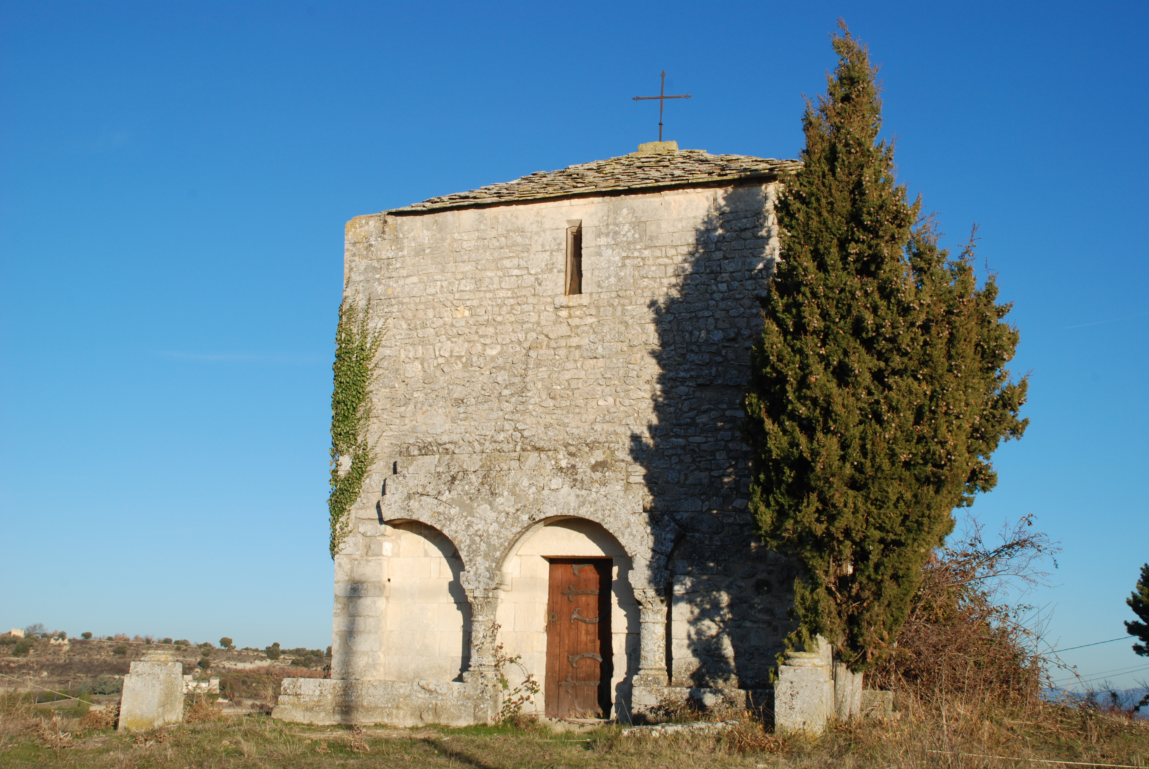 France - Provence - Chapelle Saint-Paul de Saint-Michel-l'Observatoire